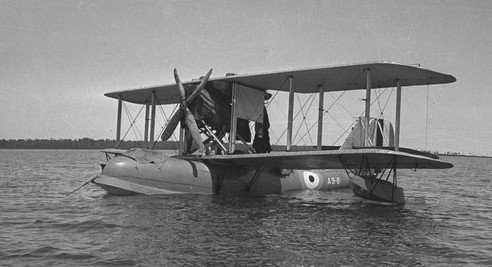 Die australische Supermarine Seagull Mk.III A9-6